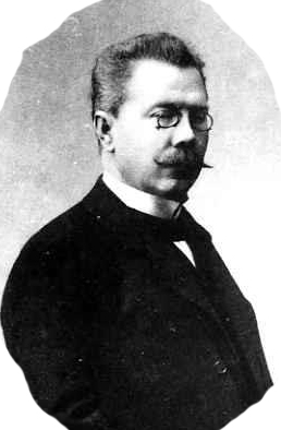 Митрофан Иосифович Гродзицкий (1 октября 1861, Минская губерния — после 1917) — юрист, судья, депутат III и IV Государственной думы от Оренбургской губернии (1907—1917).